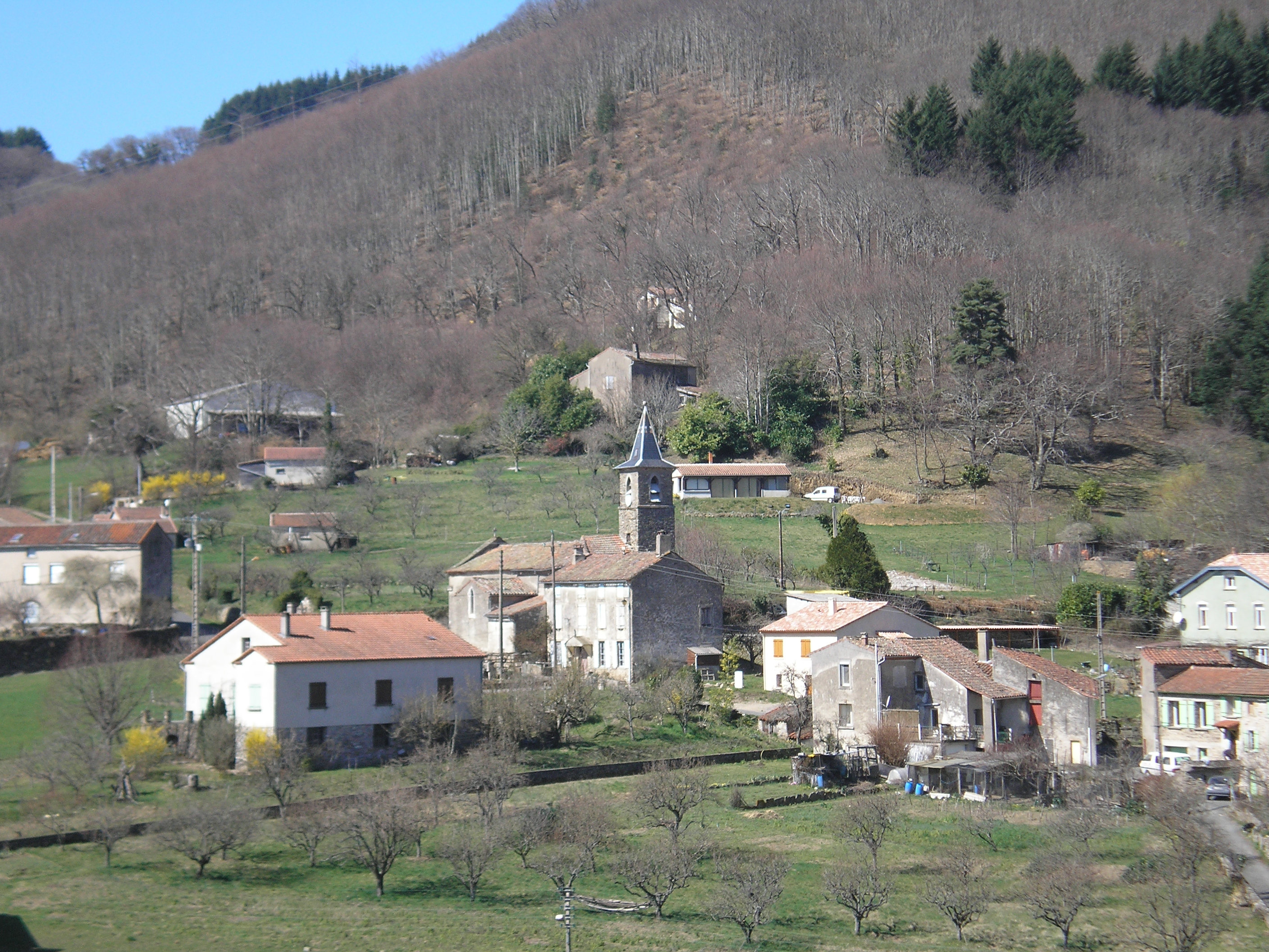 Courniou (Hérault) - vue générale de Marthomis.